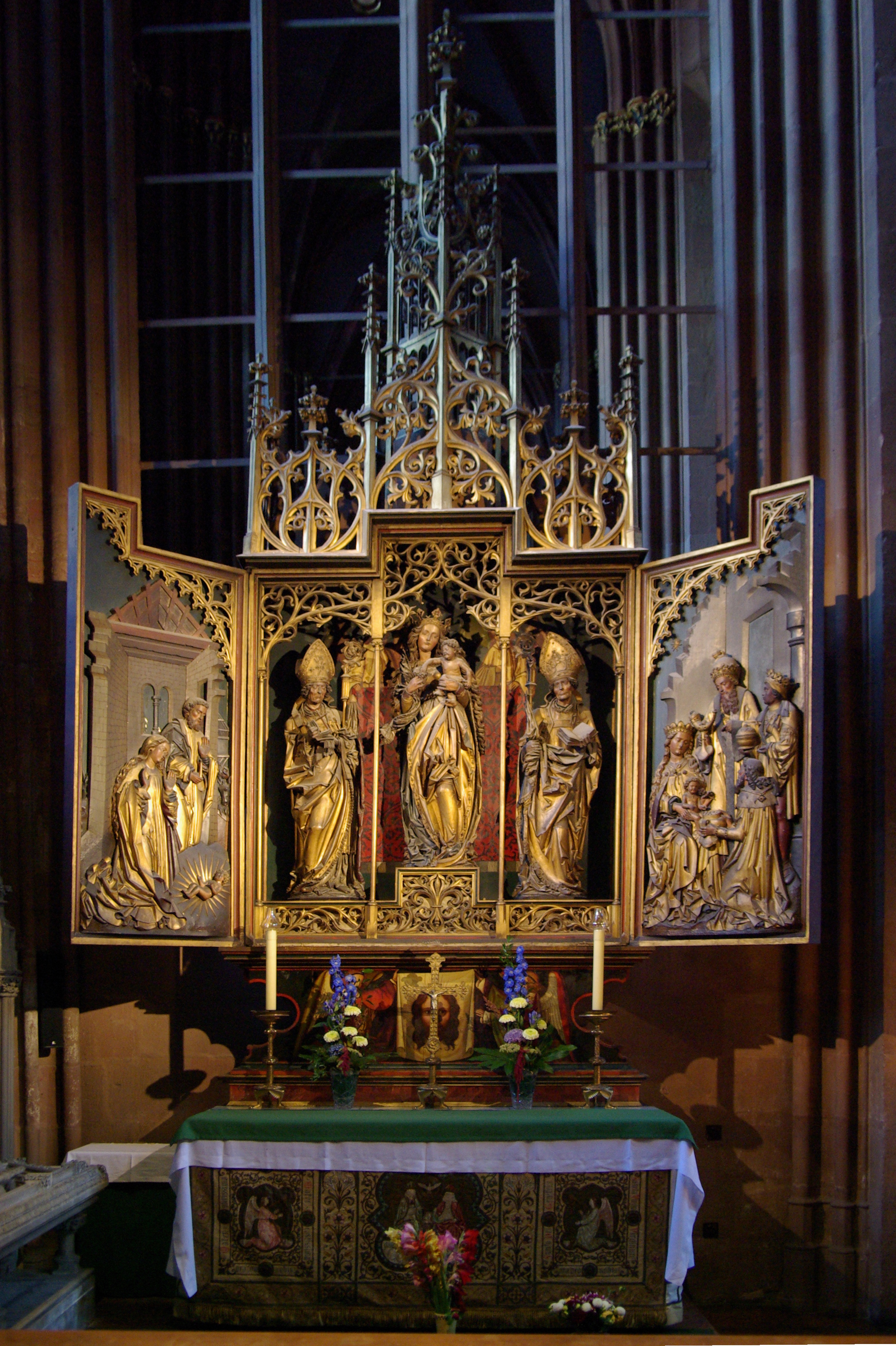 Mainz, Dom, Marienaltar